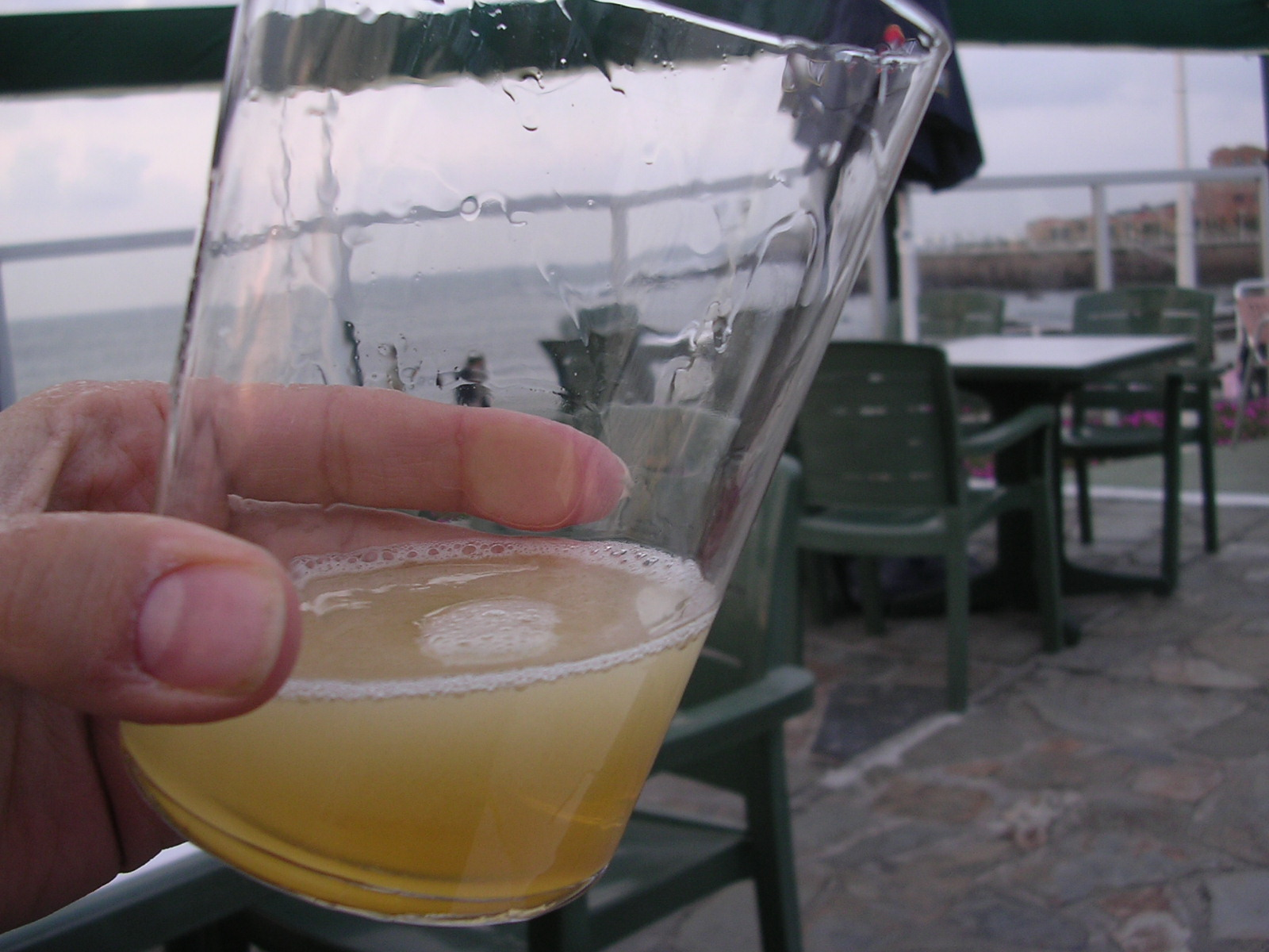 Un culete de Sidra Natural Asturiana recien escanciado. Foto tomada en una terraza cerca del mar en Gijón (Asturias)